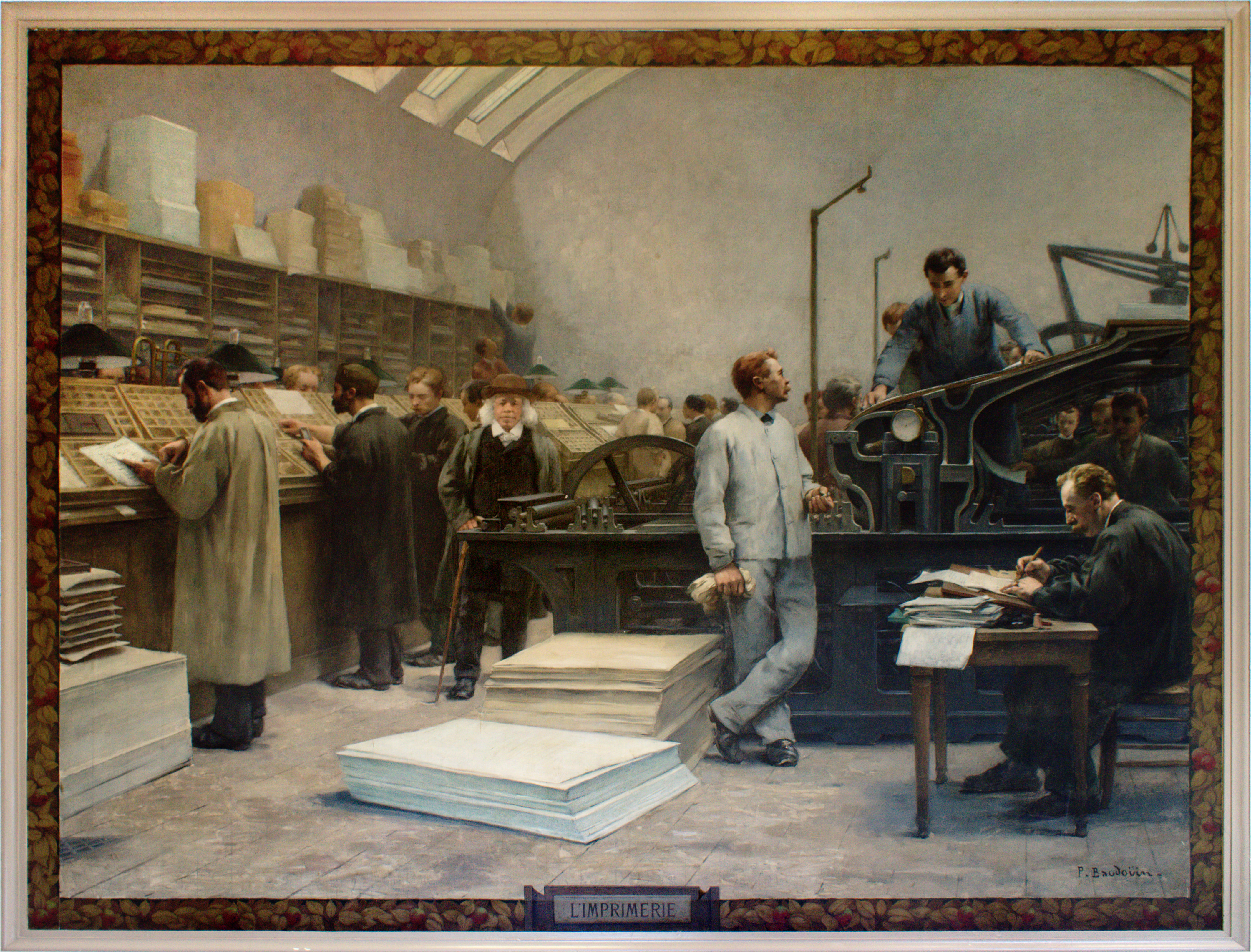 Peinture “L’imprimerie” de Paul Albert Baudoüin, peintre-fresquiste de Rouen. Certaines zones ont une colorimétrie qui diverge en raison de l’éclairage naturel/artificiel des lieux.